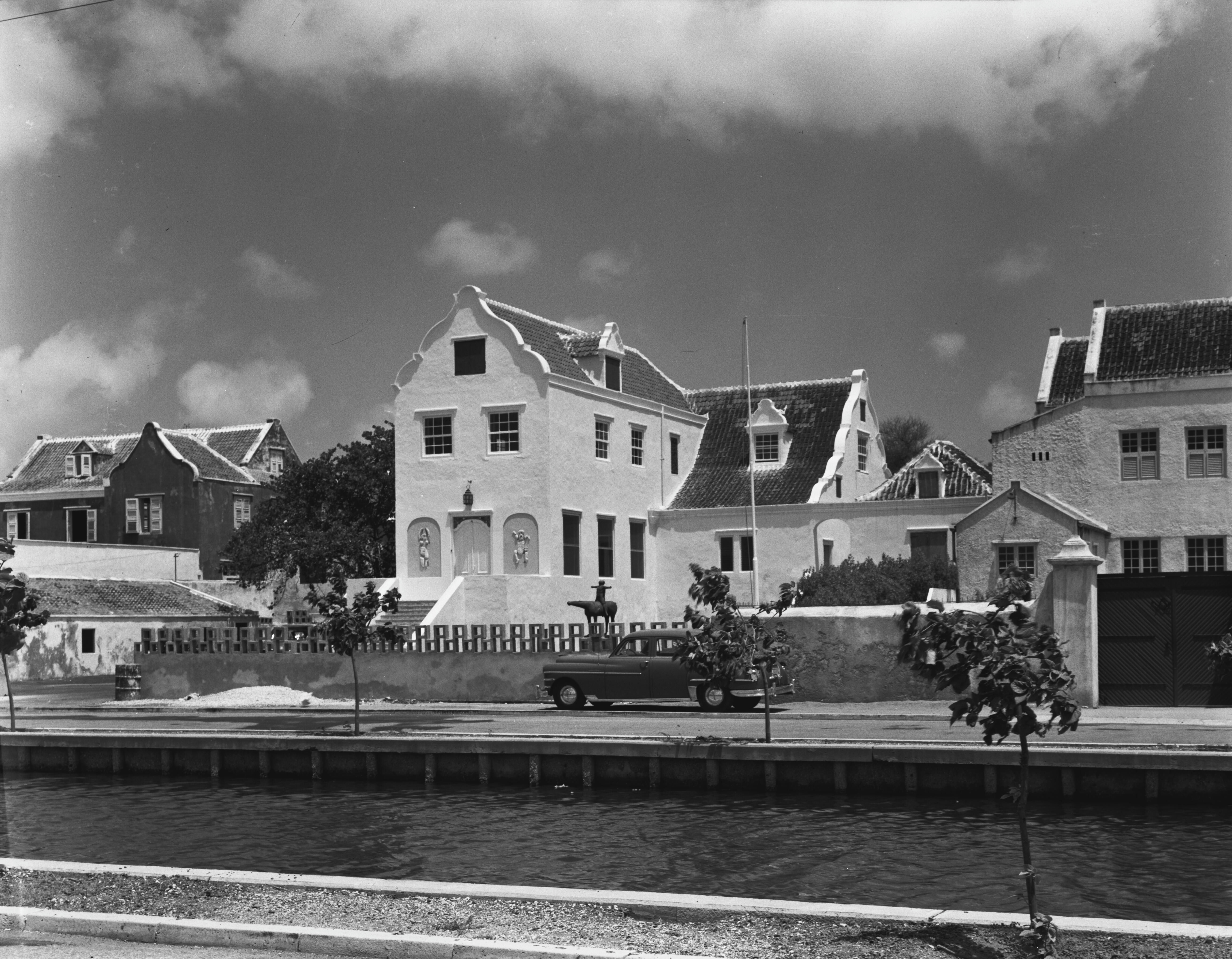 Otrabanda, Huis Stroomzicht, Pater Euwensweg, voorgevelOnderwerp: Huizen, woningen